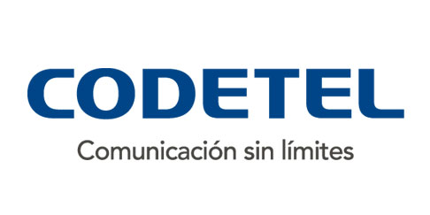 Codetel